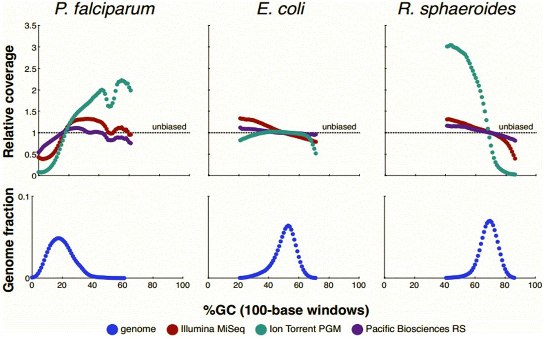 Grafikai GC tendencingumui stebėti.